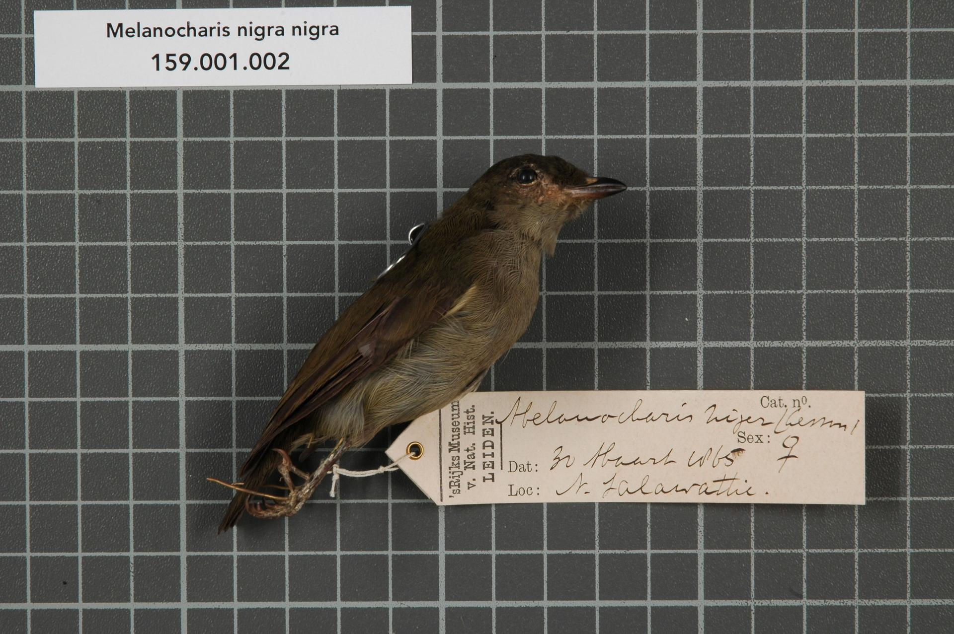 Melanocharis nigra nigra Lesson, 1830